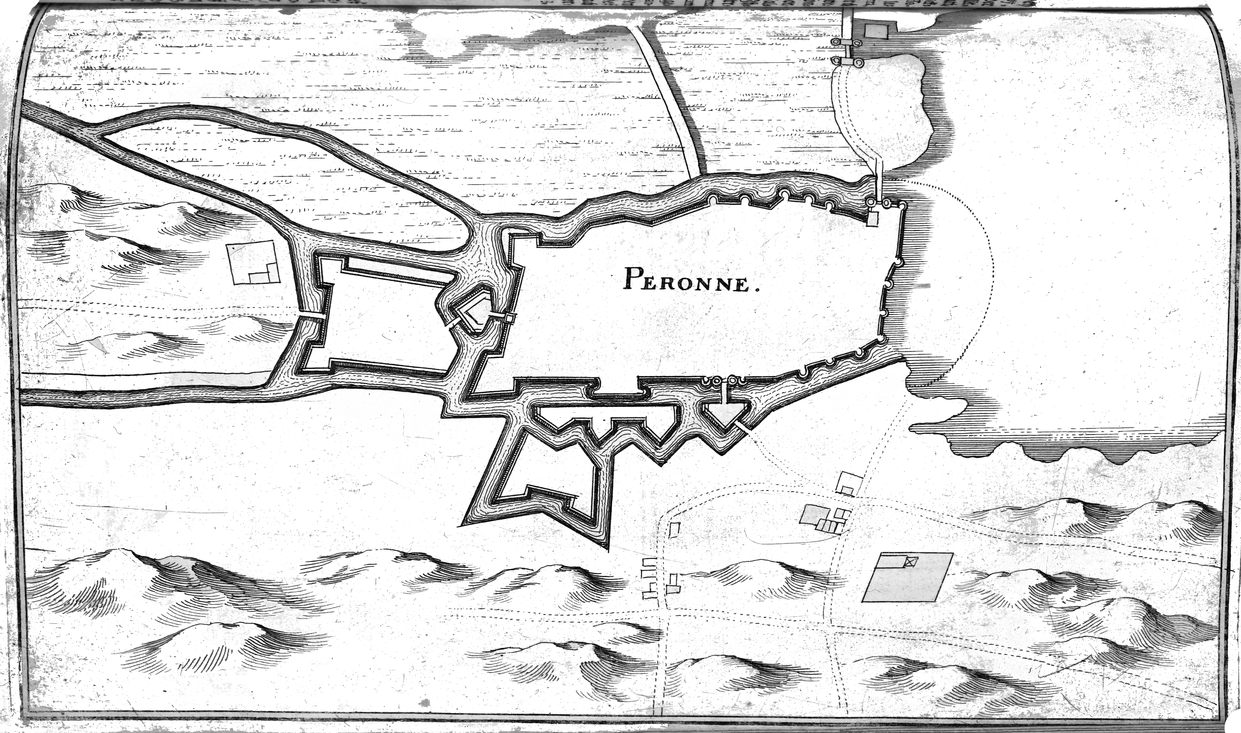 dessin provenant de "Topographia Galliae".